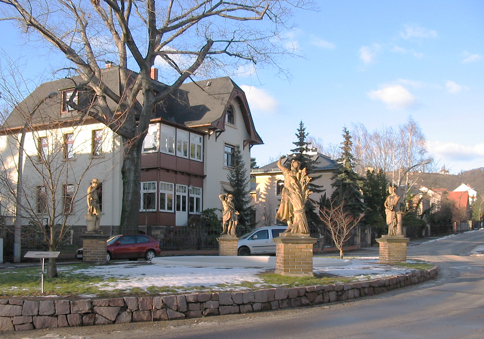 Radebeul, Fontainenplatz im Winter 2009, Brunnenbecken saniert und mit, für den Winter abgeschalteter, Fontainentechnik. Blick auf die Mietvilla Dr.-Schmincke-Allee 21 (Radebeul).